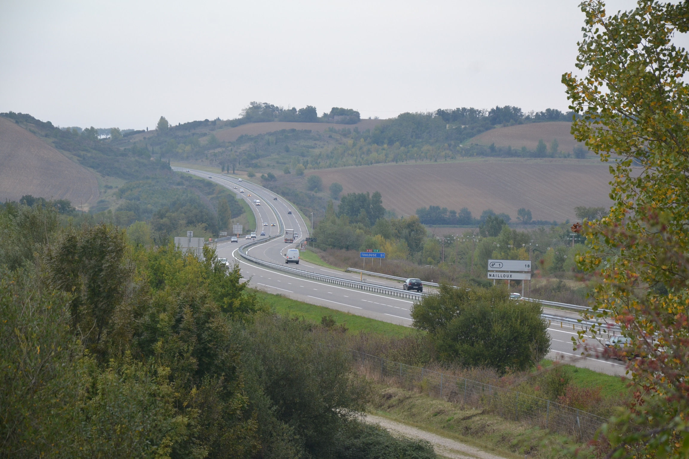 L'autoroute A66 près de Mazères (Ariège, France). Vue vers le nord.